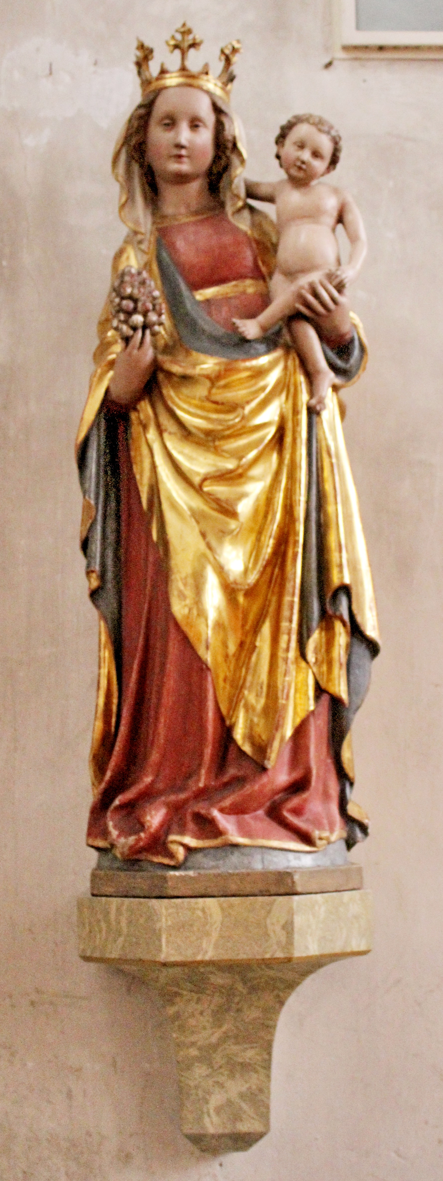 Spätgotischen Muttergottes mit Kind und Weintraube in der St. Nikolauskirche in Veringenstadt. Um 1430–1440; Höhe 125 cm; Holz.